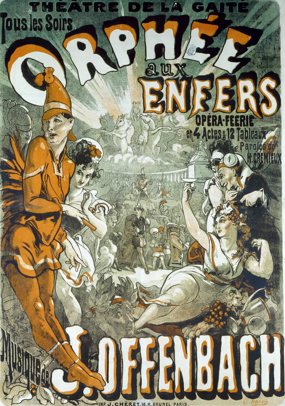 Affiche: Orphée aux Enfers. Musique d'Offenbach